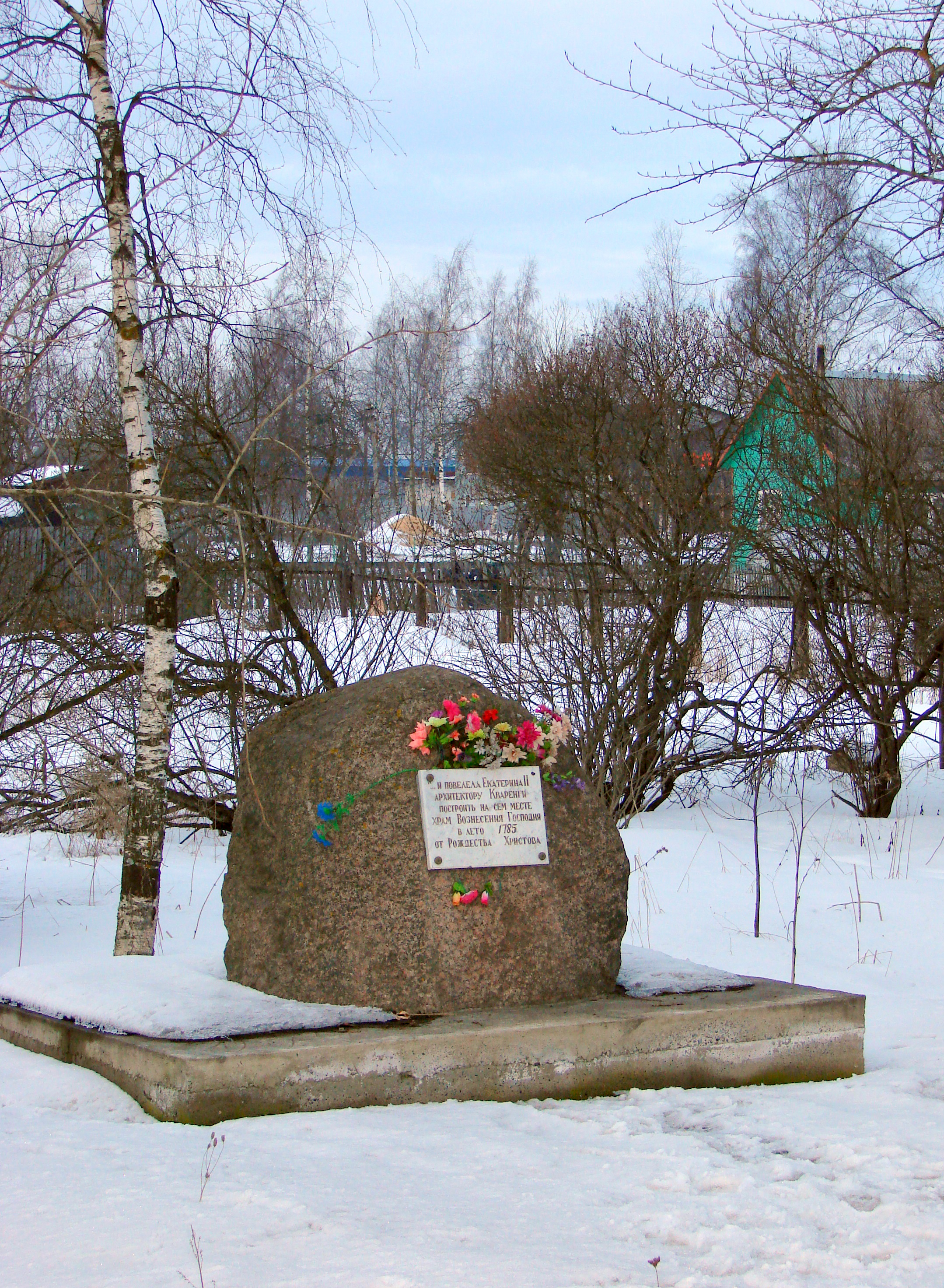 Храмовый камень на месте церкви Вознесения Господня (деревня Фёдоровское, Тосненский район, Ленинградская область)